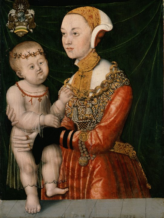 GG 28, Monogrammist HB mit dem Greifenkopf (tätig 2. Viertel 16. Jh.), Bildnis einer Frau mit Kleinkind, 1528, Holz, 53,3 x 39,7 cm